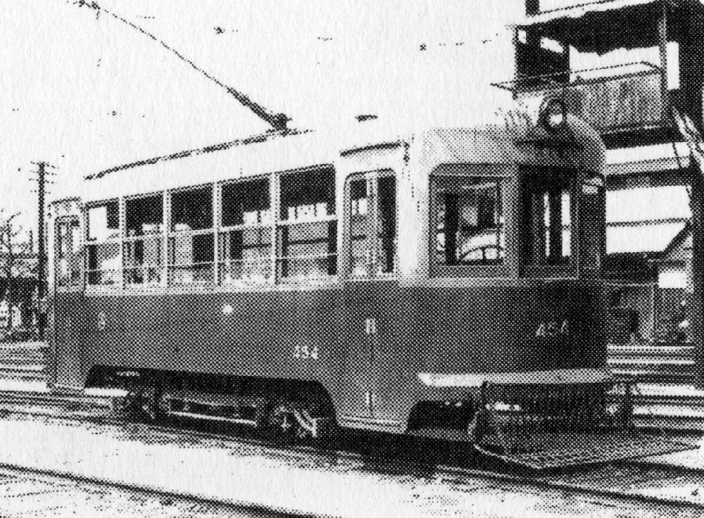 1940年ごろに撮影された広島瓦斯電軌（広島電鉄）の450形電車454号。